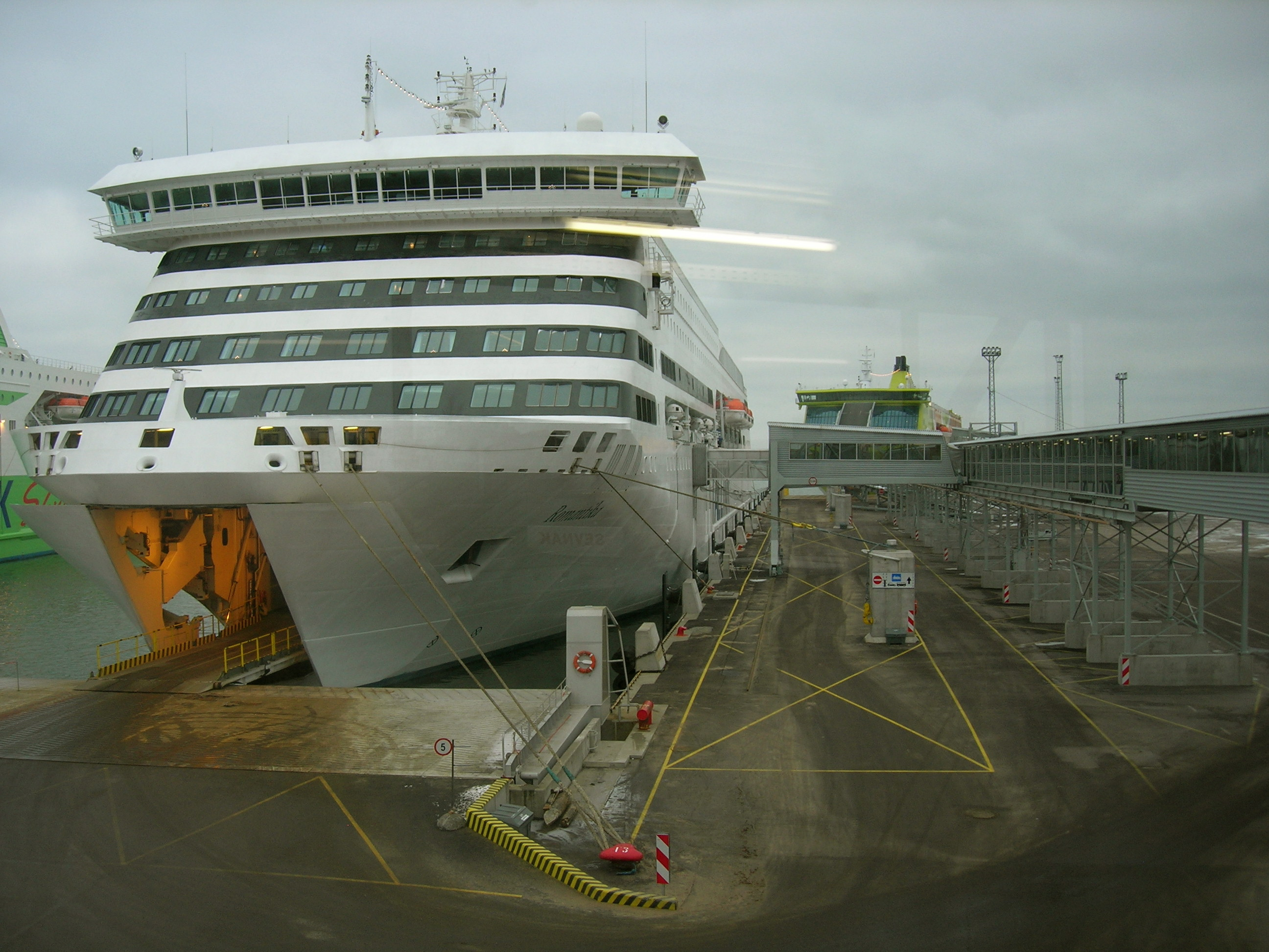 Tallink Romantika (Star on the left and Superstar on the right)